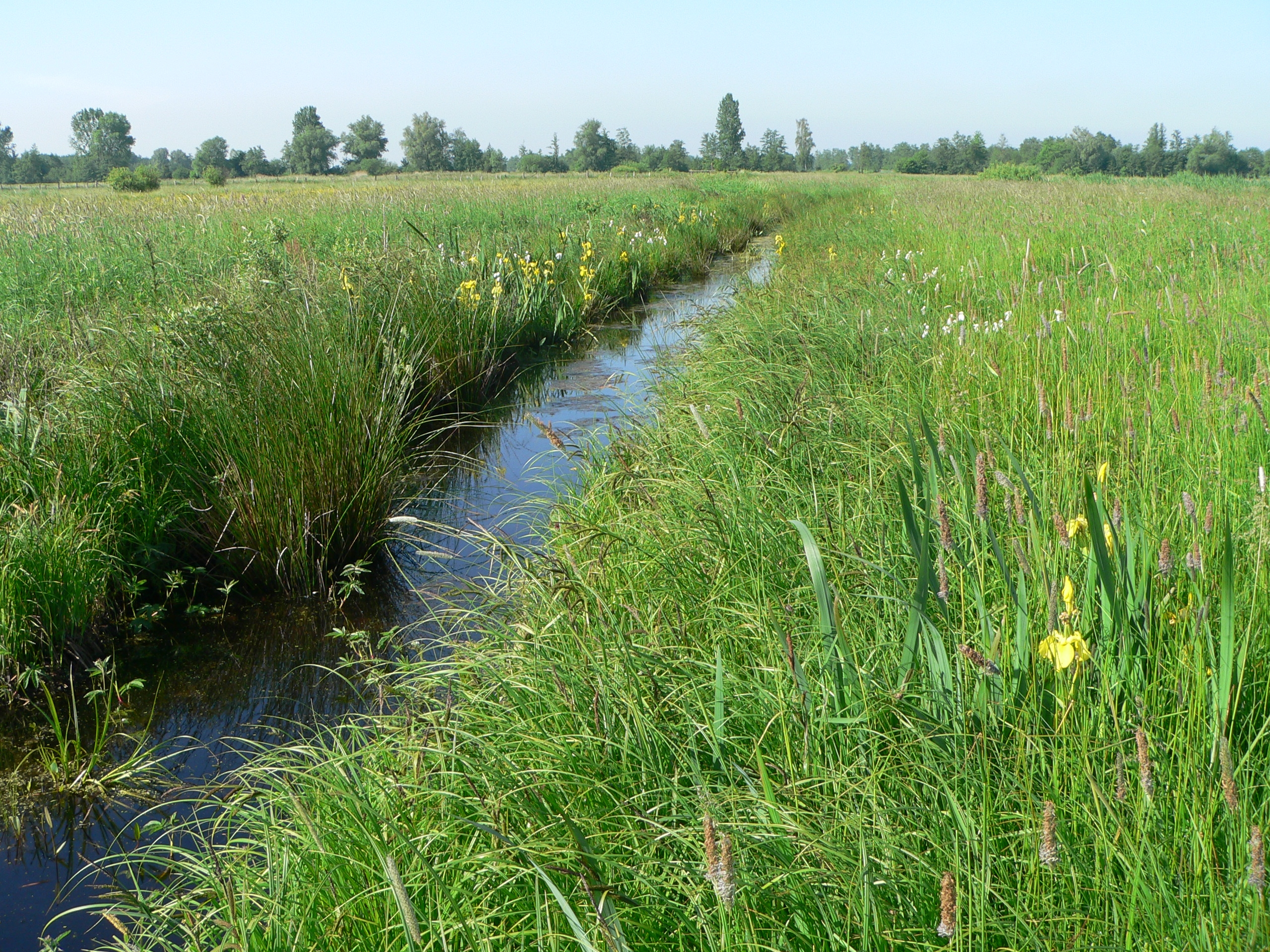 Typischer Beetgraben